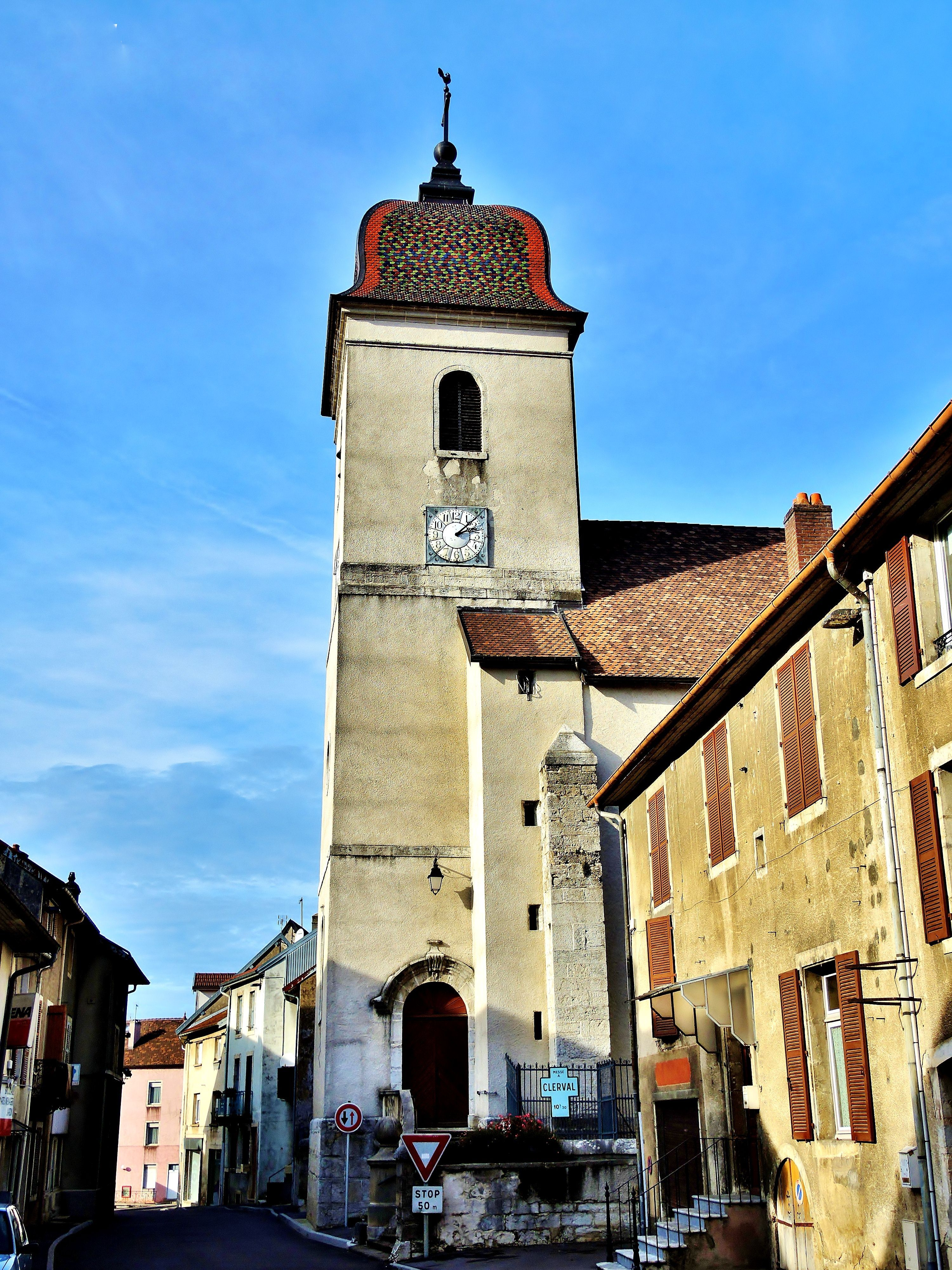 Eglise Saint André, à Clerval, Doubs